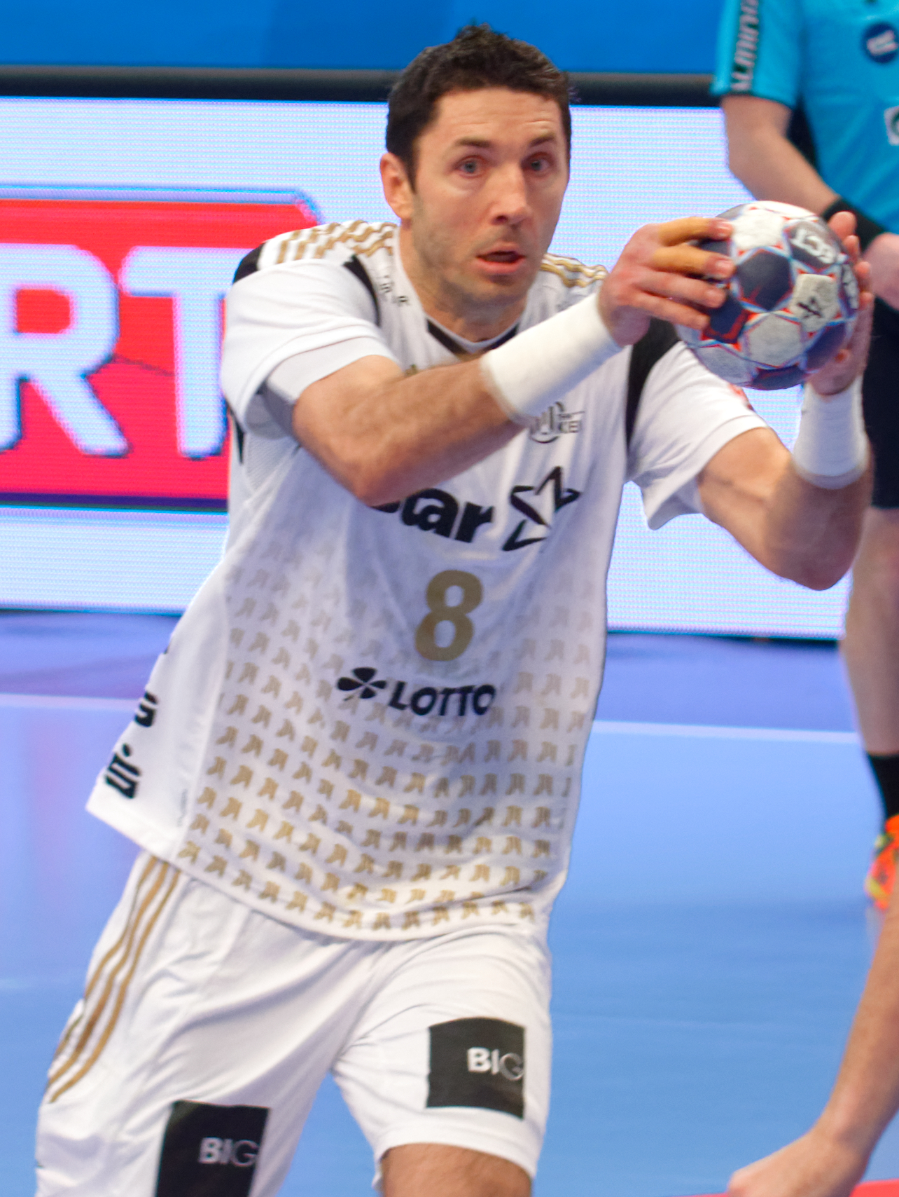 Rencontre de phase de groupe de la ligue des champions 2016-17 entre le PSG et le THW Kiel. A Coubertin, le 12 mars 2017.